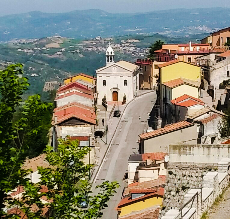 Ariano Irpino, santuario della Madonna del Carmine